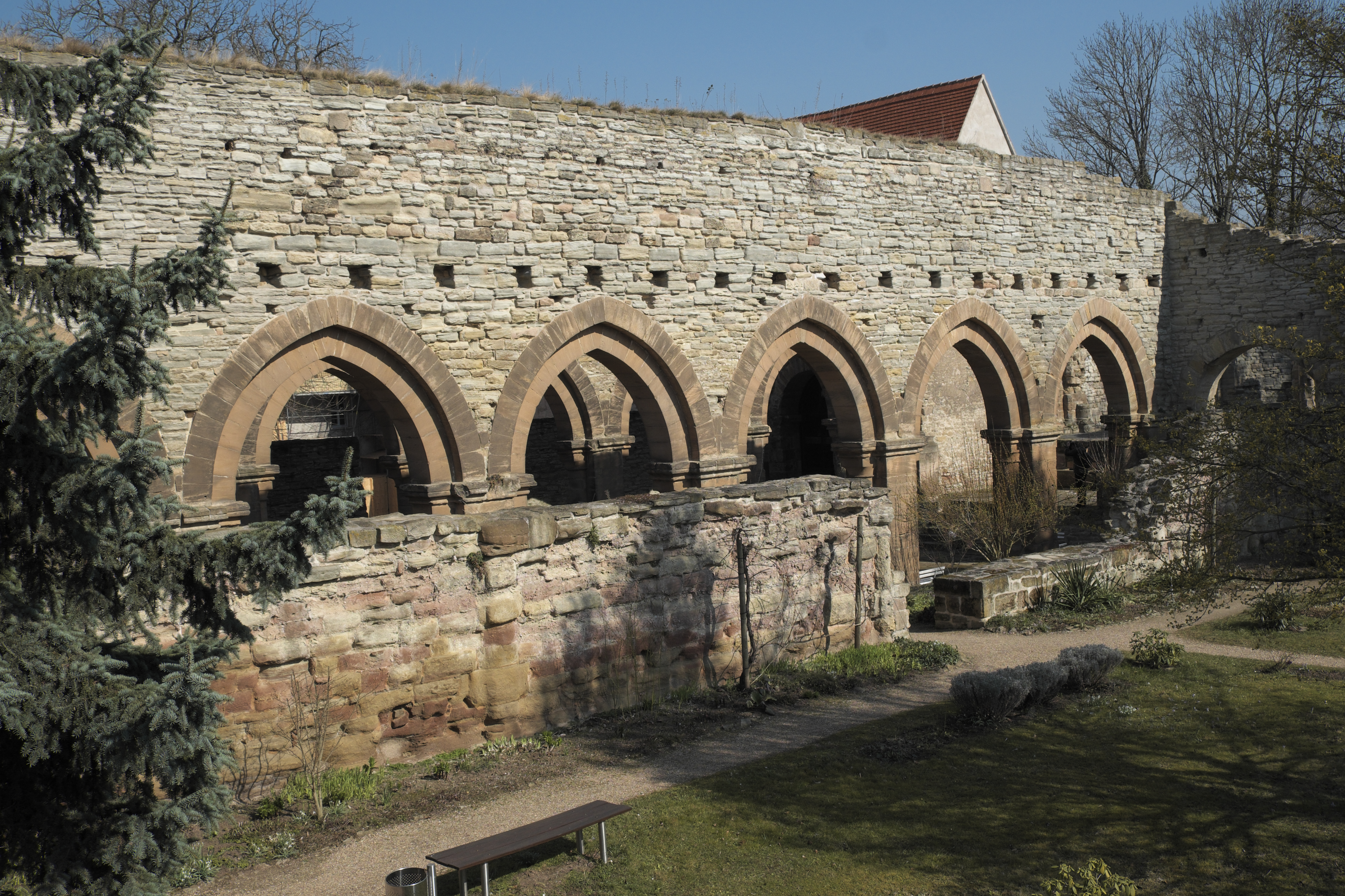 Ruinen der Marienkirche, ehemalige Klosterkirche in Memleben im Burgenlandkreis in Sachsen-Anhalt/Deutschland